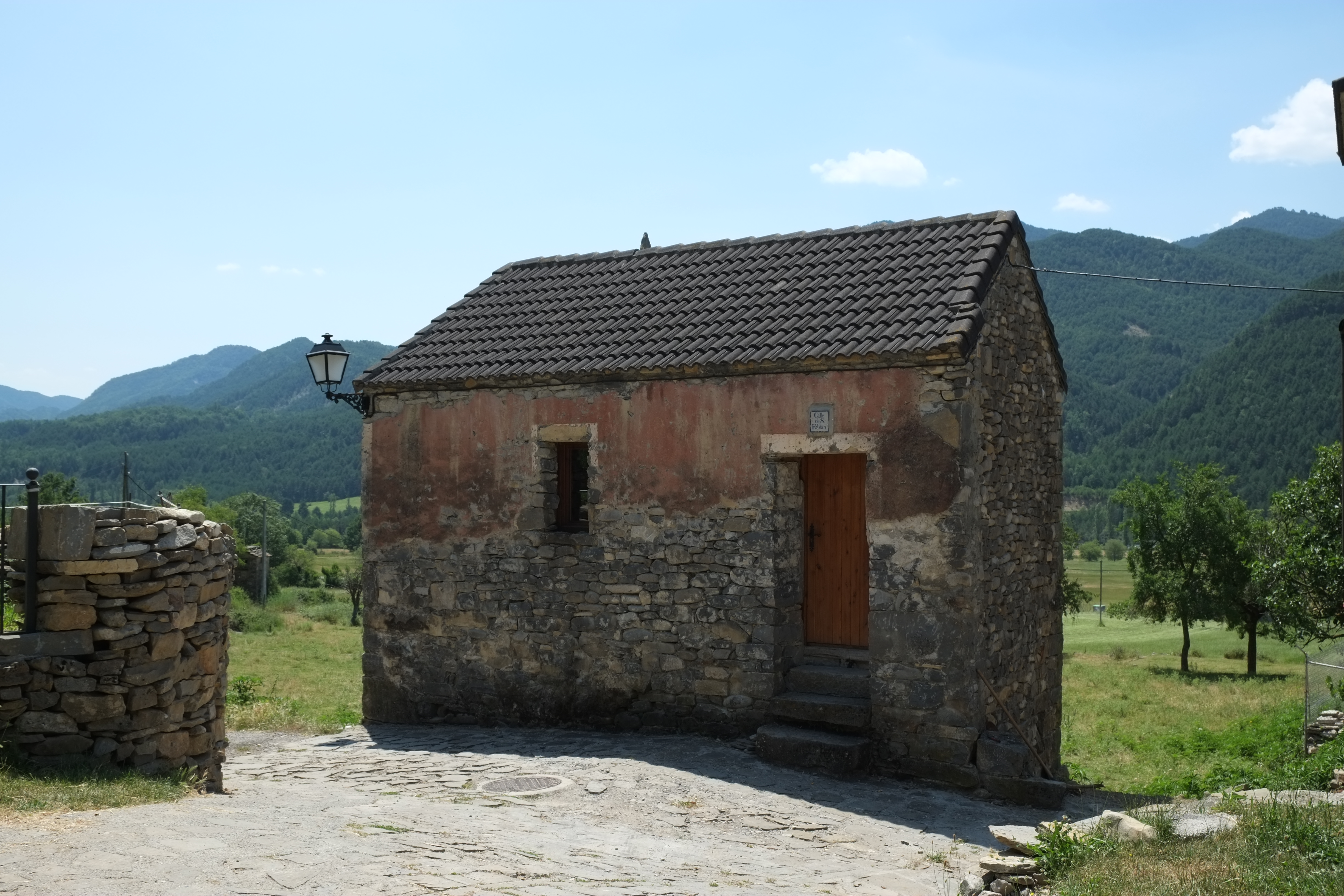 Javierre de Ara (Fiscal) in Aragonien (Spanien)